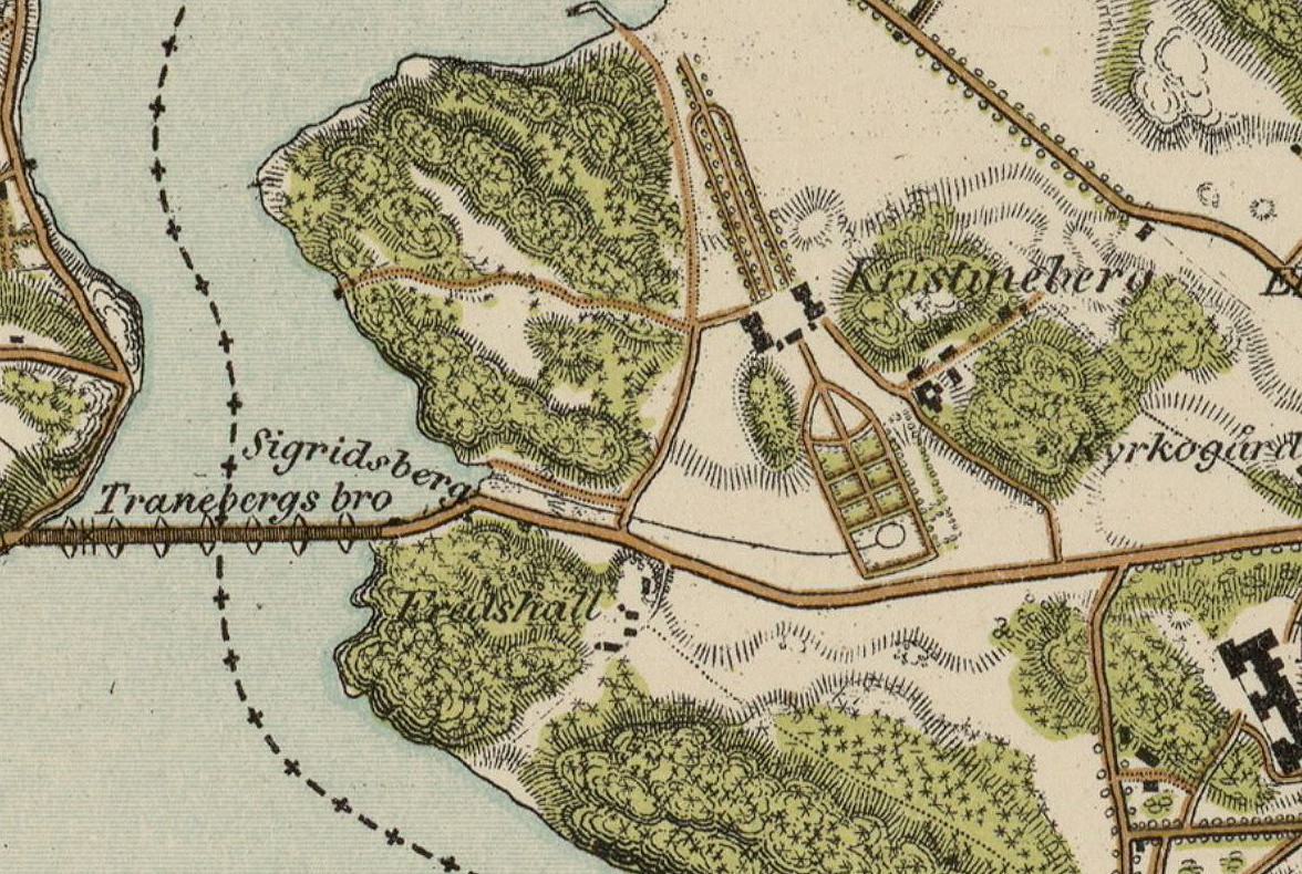 Kristineberg, Fredhäll, Sigridsberg samt Tranebergsbron på 1860-talet